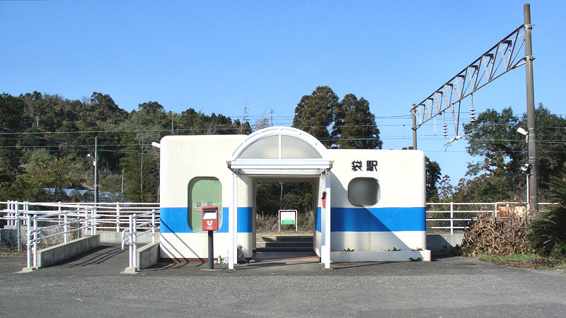 肥薩おれんじ鉄道線袋駅 駅舎 撮影者/著者/著作権保有者 : MK Products (本人がアップロード) 撮影日 : 2006/12/31 袋駅用にアップロードした画像です。良い画像があれば別の画像に差し変えてください。